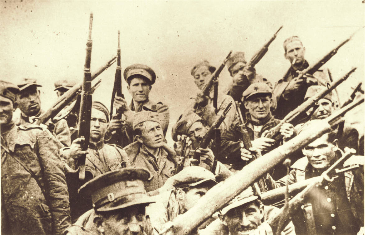 Srpskohrvatski / српскохрватски: Borci Bilećkog partizanskog bataljona na Baljcima, srez Bileća, 1941.